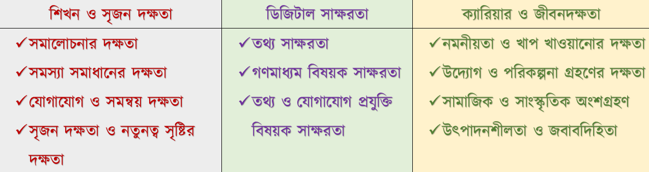 একবিংশ শতাব্দীর দক্ষতাসমূহ